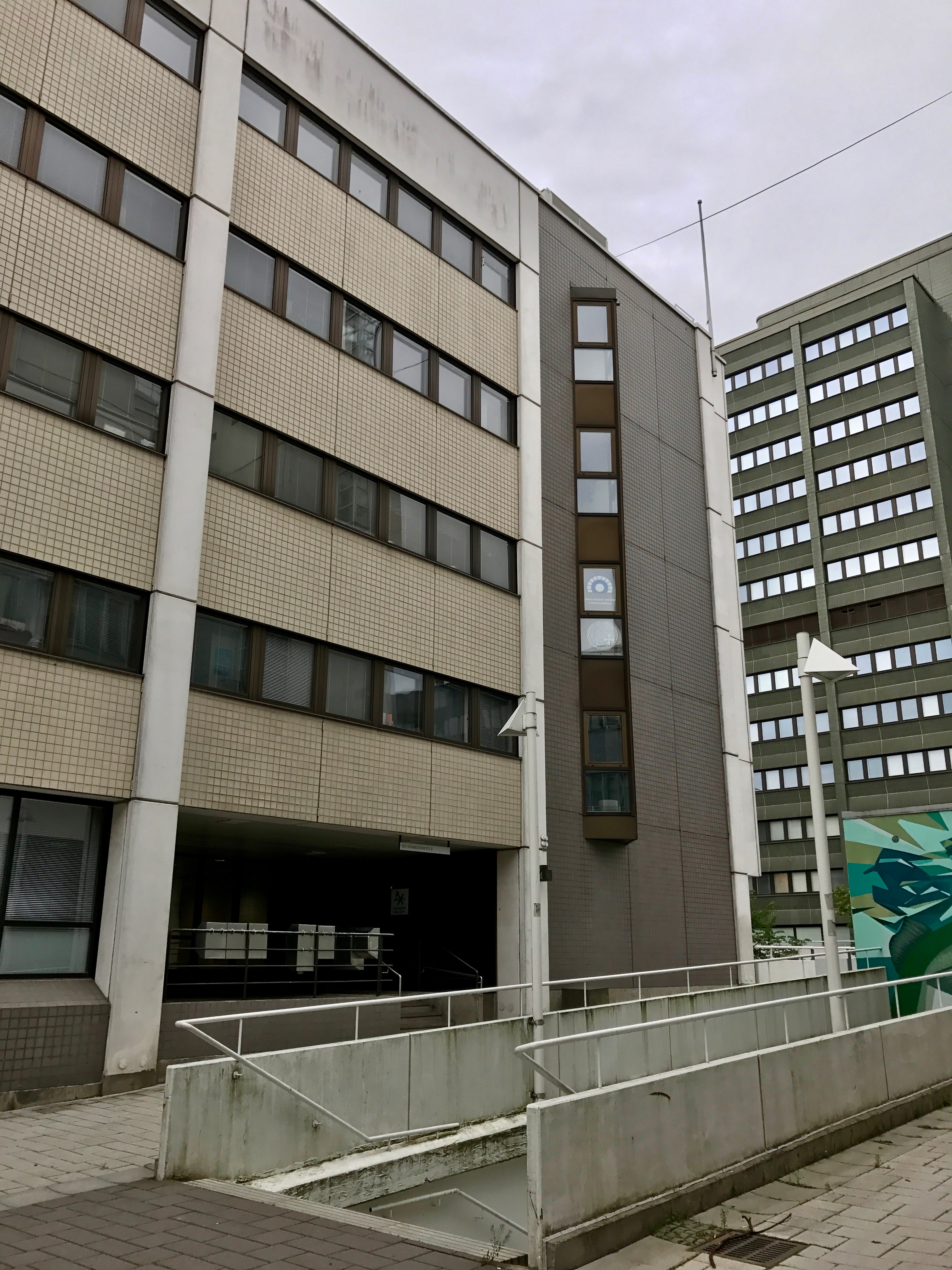 Toimistorakennus Helsingin Itä-Pasilassa, Ratamestarinkatu 9.